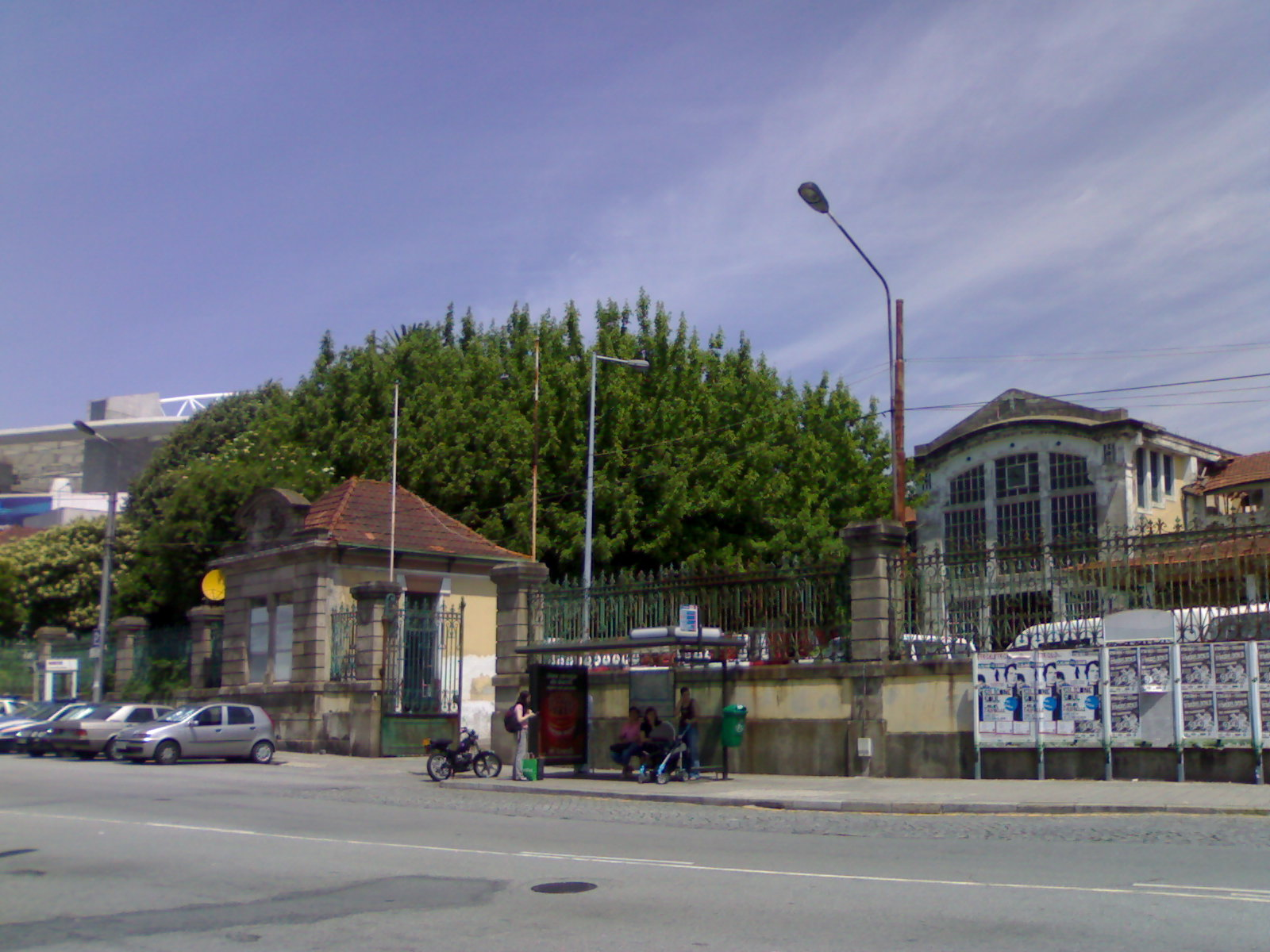 Matadouro Industrial do Porto, na Rua de S.Roque, Campanhã.